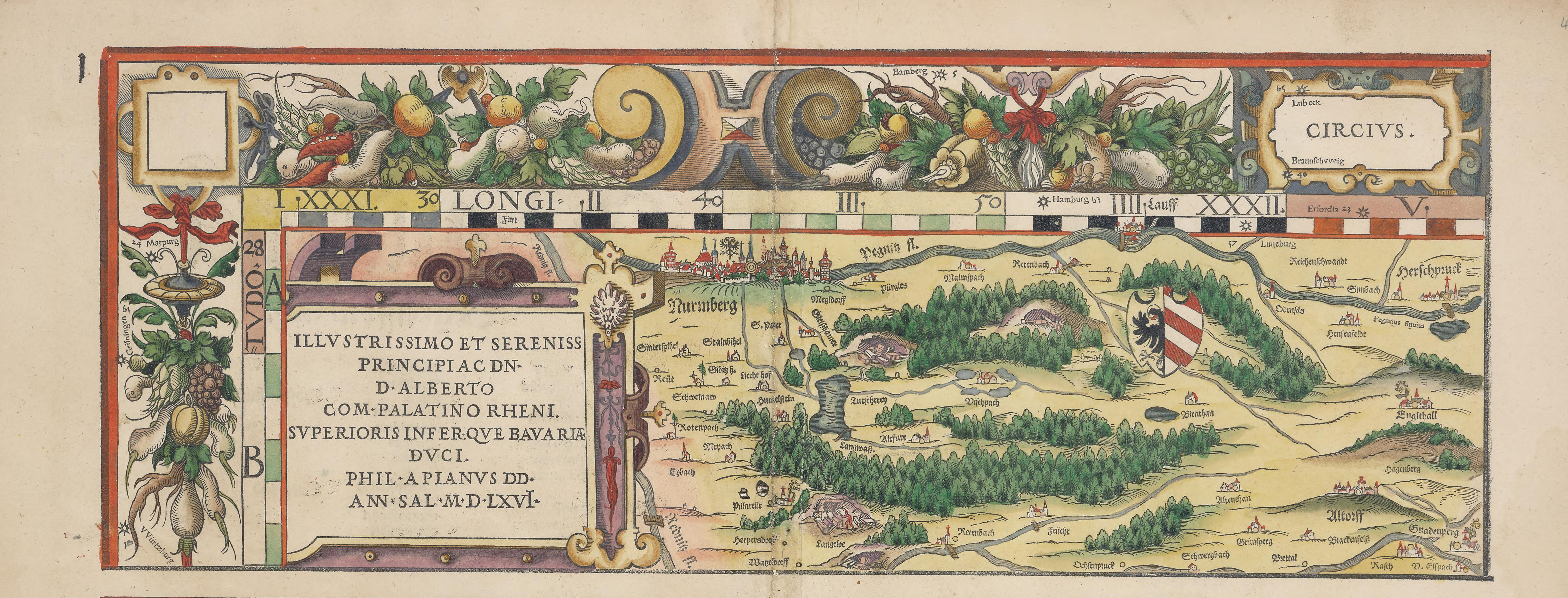 Philipp Apian - Bairische Landtafeln von 1568 (Tafel 1) ca. 1:140.000, Gesamtgröße des Originals 156 x 159 cm, je Blatt 43 x 33 cm Auf der Basis der „Großen Karte“ ließ Philipp Apian 1566 von Jost Amman Holzschnitte im kleineren Maßstab von 1:144.000 anfertigen. Diese so genannten Bairischen Landtafeln, aufgeteilt in 24 Holzschnitte, verlegte Apian in seiner eigenen Druckerei. Die Genauigkeit der Landkarten wurde erst im 19. Jahrhundert übertroffen. Noch Napoleon benutzte sie für den Einmarsch in Bayern. Ein Originaldruck der Karte ist im Stadtmuseum Ingolstadt ausgestellt, die Druckstöcke befinden sich heute im Bayerischen Nationalmuseum in München. Abraham Ortelius verbreitete kolorierte Kupferstiche dieser Landtafeln in Buchform „ex tabula Philippi Apiani“.